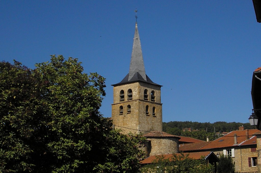 église du 12ème siècle Ste Dutrille